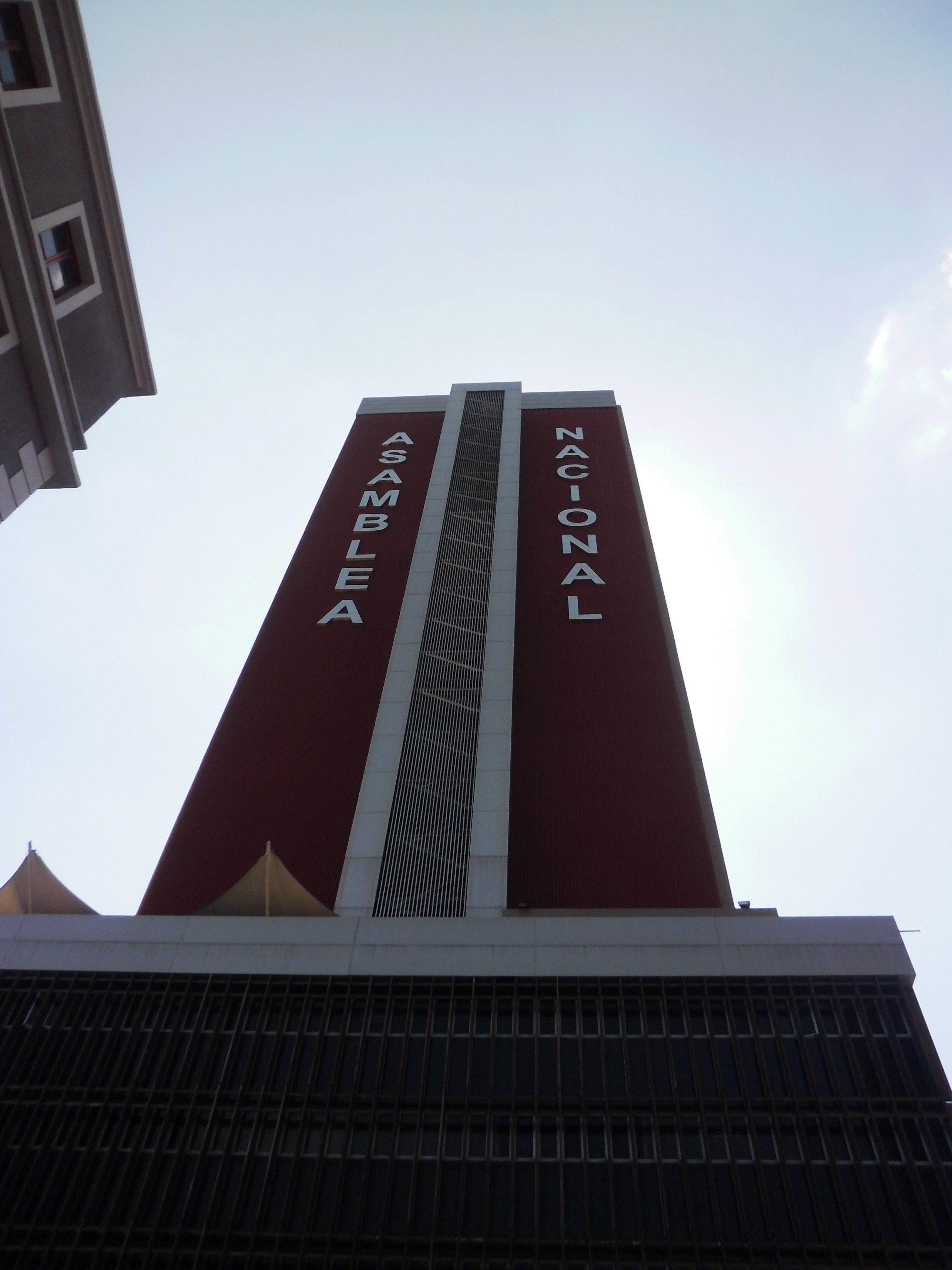 Edificio Administrativo de la Asamblea Nacional de Venezuela "Jose María Vargas"